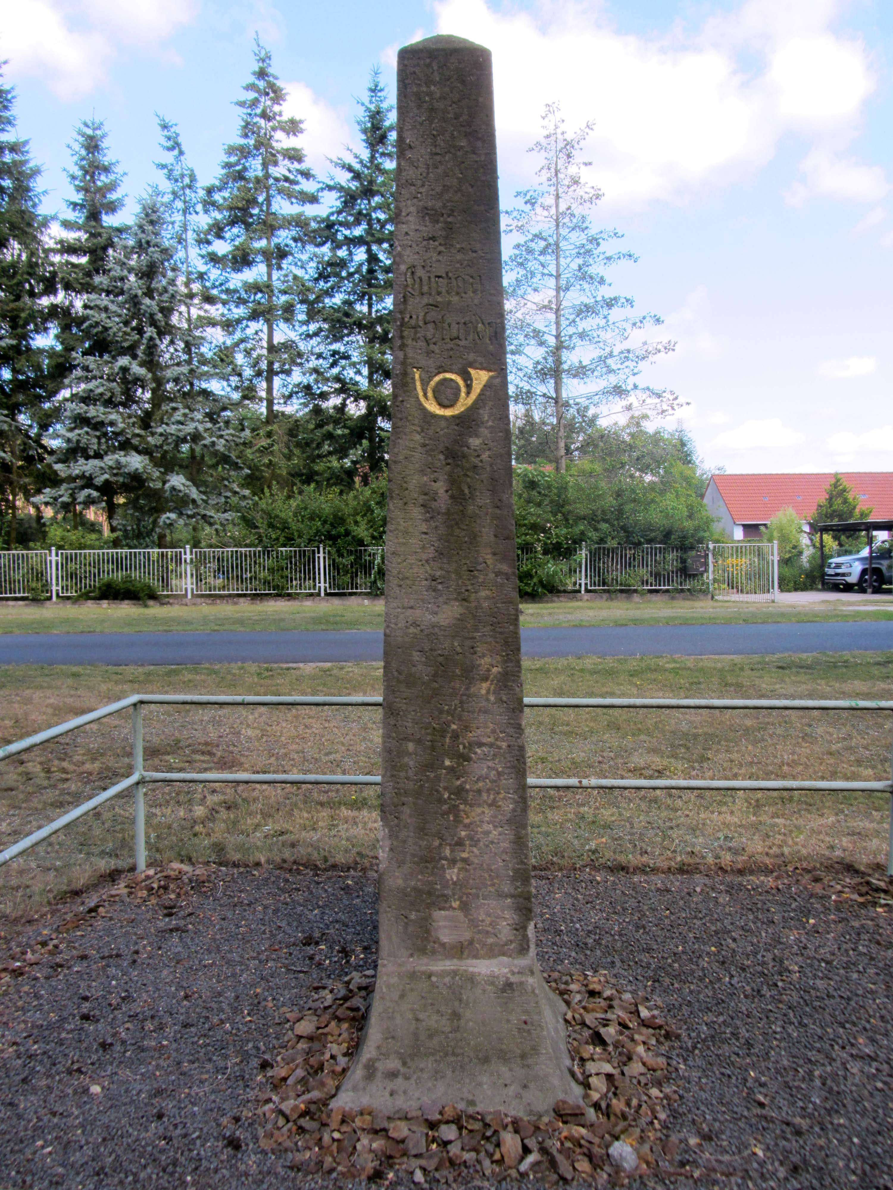 Kursächsische Postmeilensäule-Ganzmeilensäule Nr. 44, Schliebener Straße in Hohenbucko. Text: Luckau 4 Stundn, Schlieben 2 Stunden, Posthorn